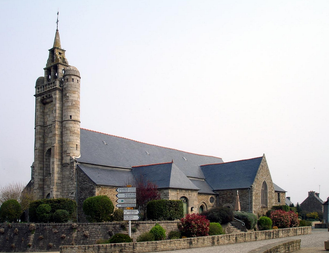 Eglise de Pleudaniel (Côtes-d'Armor), France